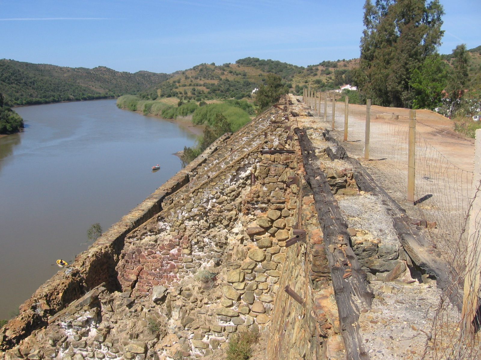 Parte superior da estrutura de descarga de minério